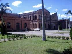 Museu Ferroviário Barão de Mauá (Baron of Mauá Railroad Museum), Jundiaí, Brazil.